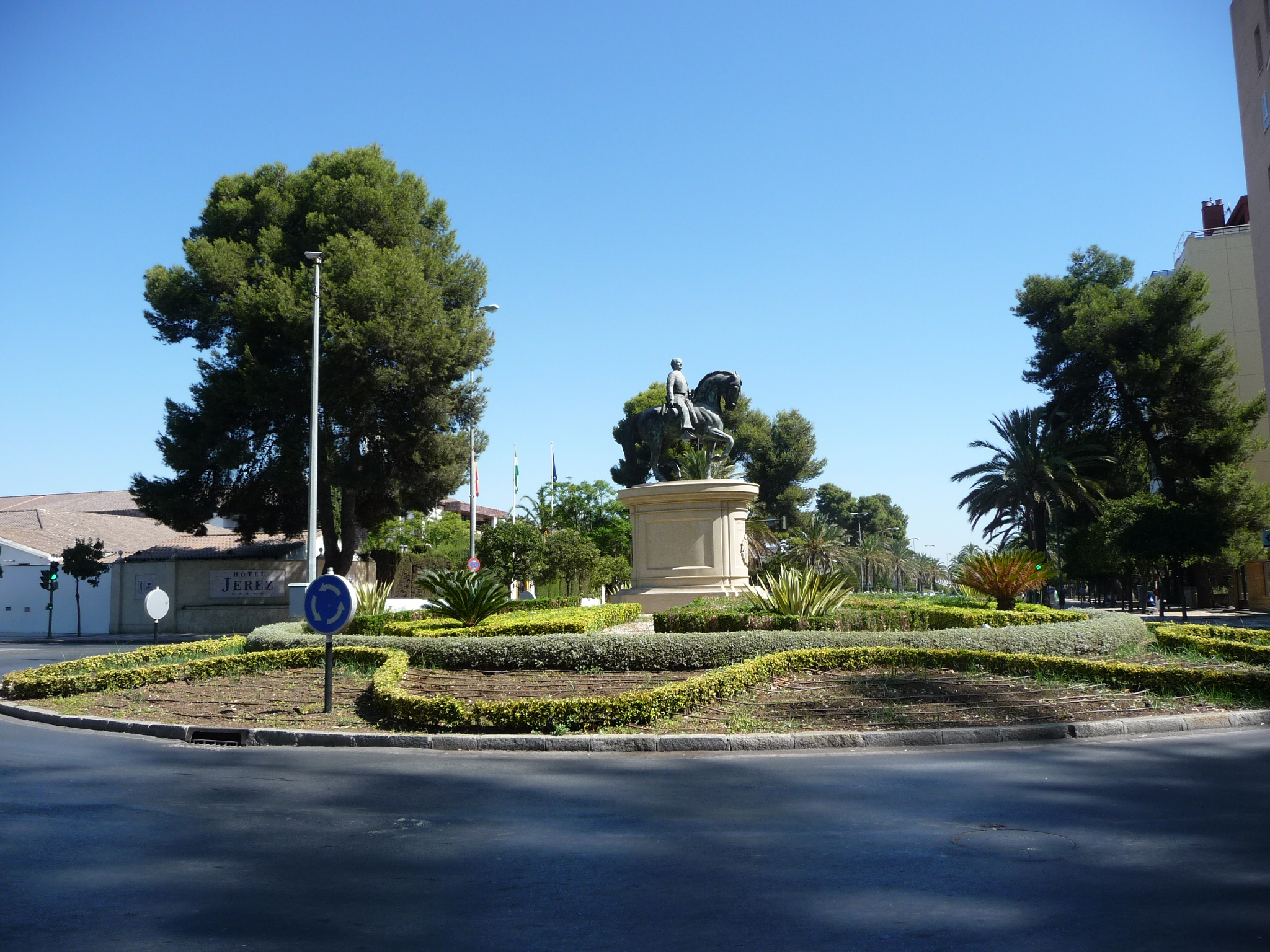 Monumentos-Jerez--P1040524.JPG